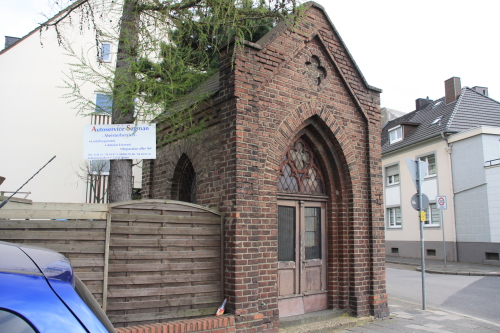 Marienkapelle Ecke Monschauer Str./Kapellenstr. in Düren-Rölsdorf